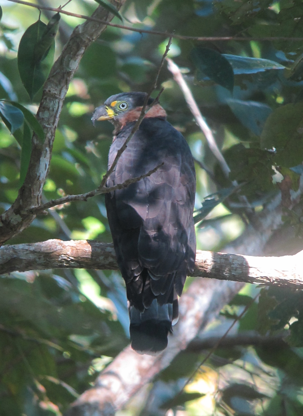 Puerto Nariño, Amazonas, Colombia